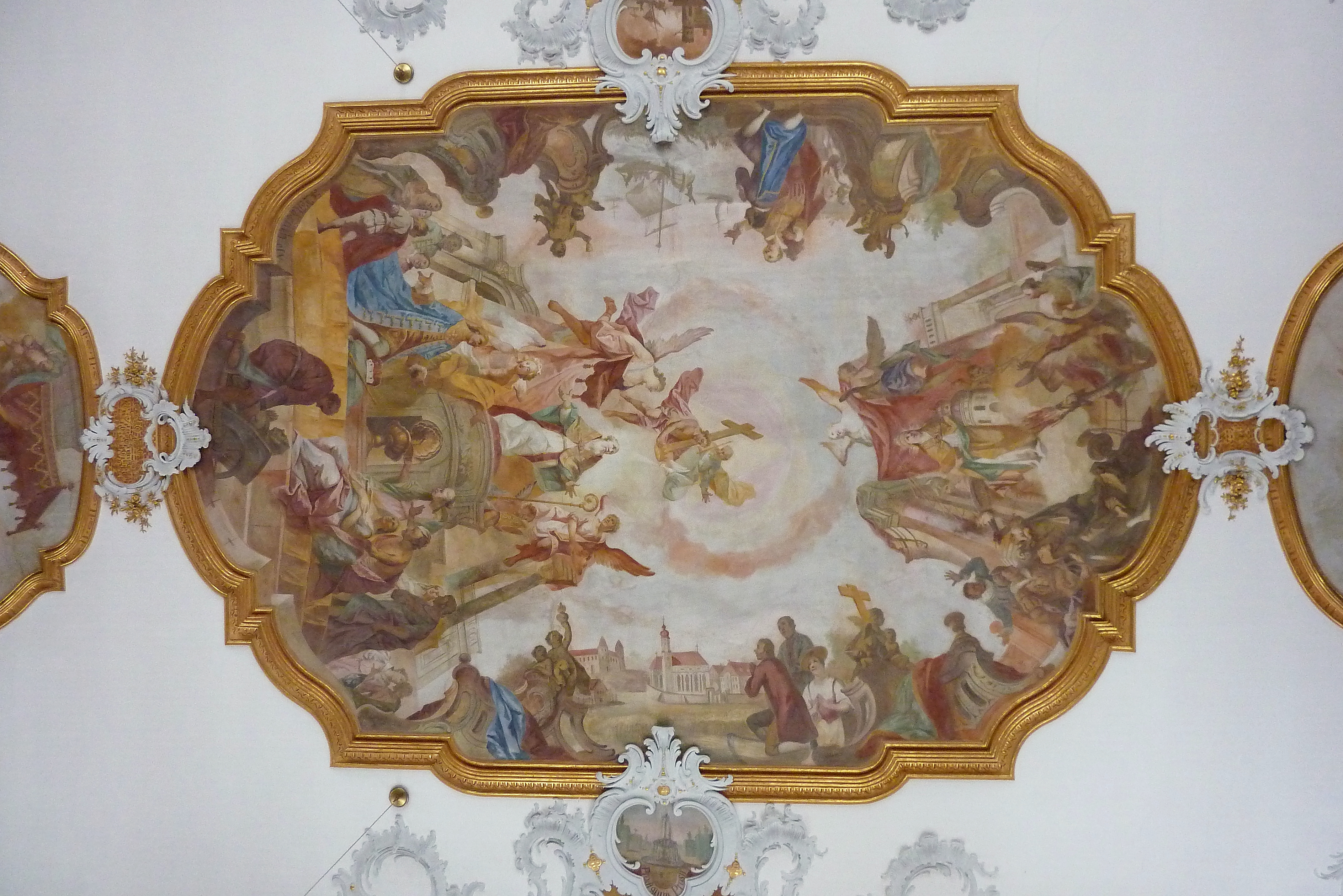 Katholische Pfarrkirche St. Nikolaus in Oberndorf am Lech, einer Gemeinde im Landkreis Donau-Ries (Bayern), Deckenfresko im Langhaus von Joseph Leitkrath von 1776; Darstellung: Verherrlichung des hl. Nikolaus, mit Darstellung der Kirche